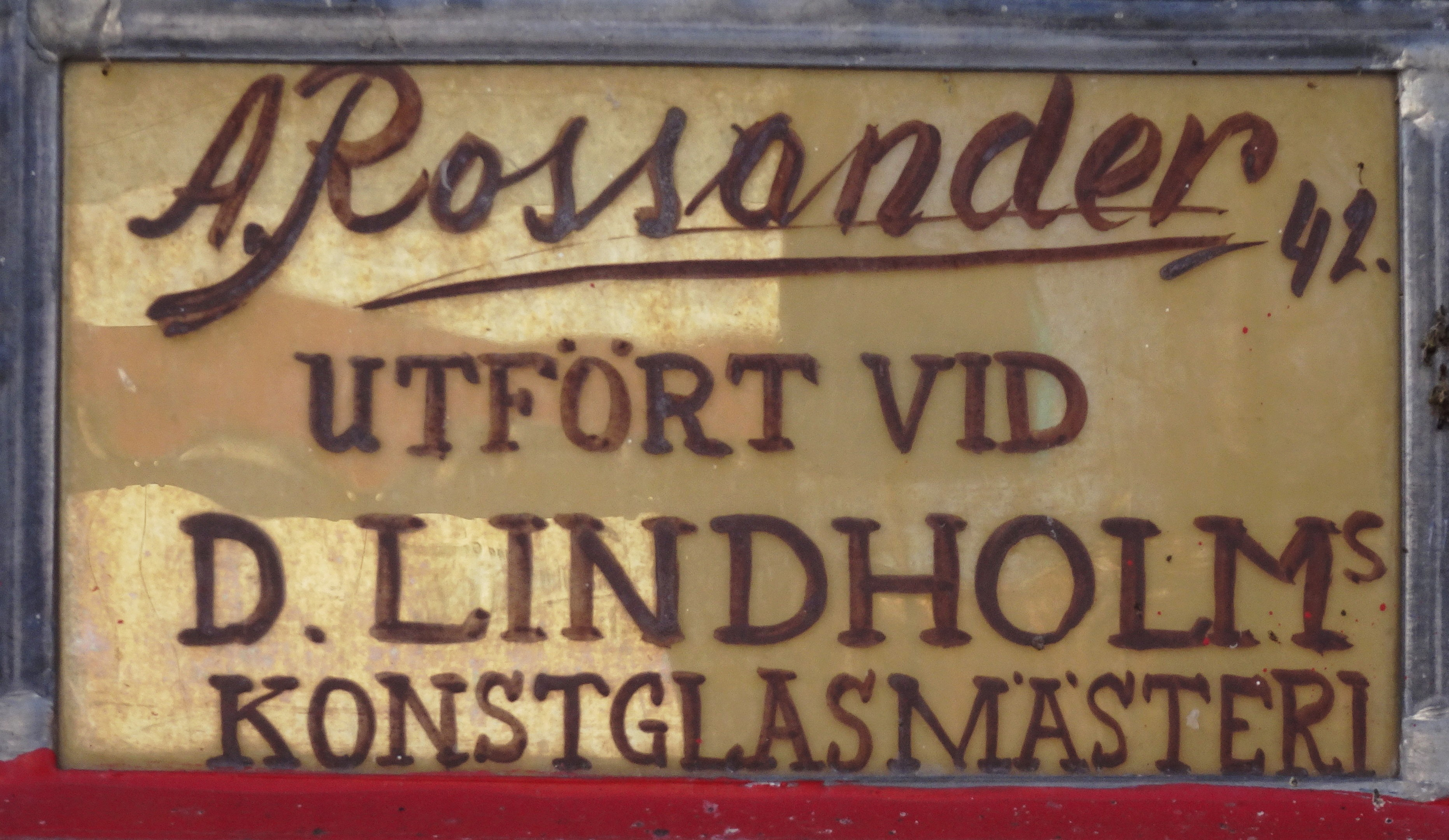 Armand Rossanders glaskonst med motiv från Gröna Lund